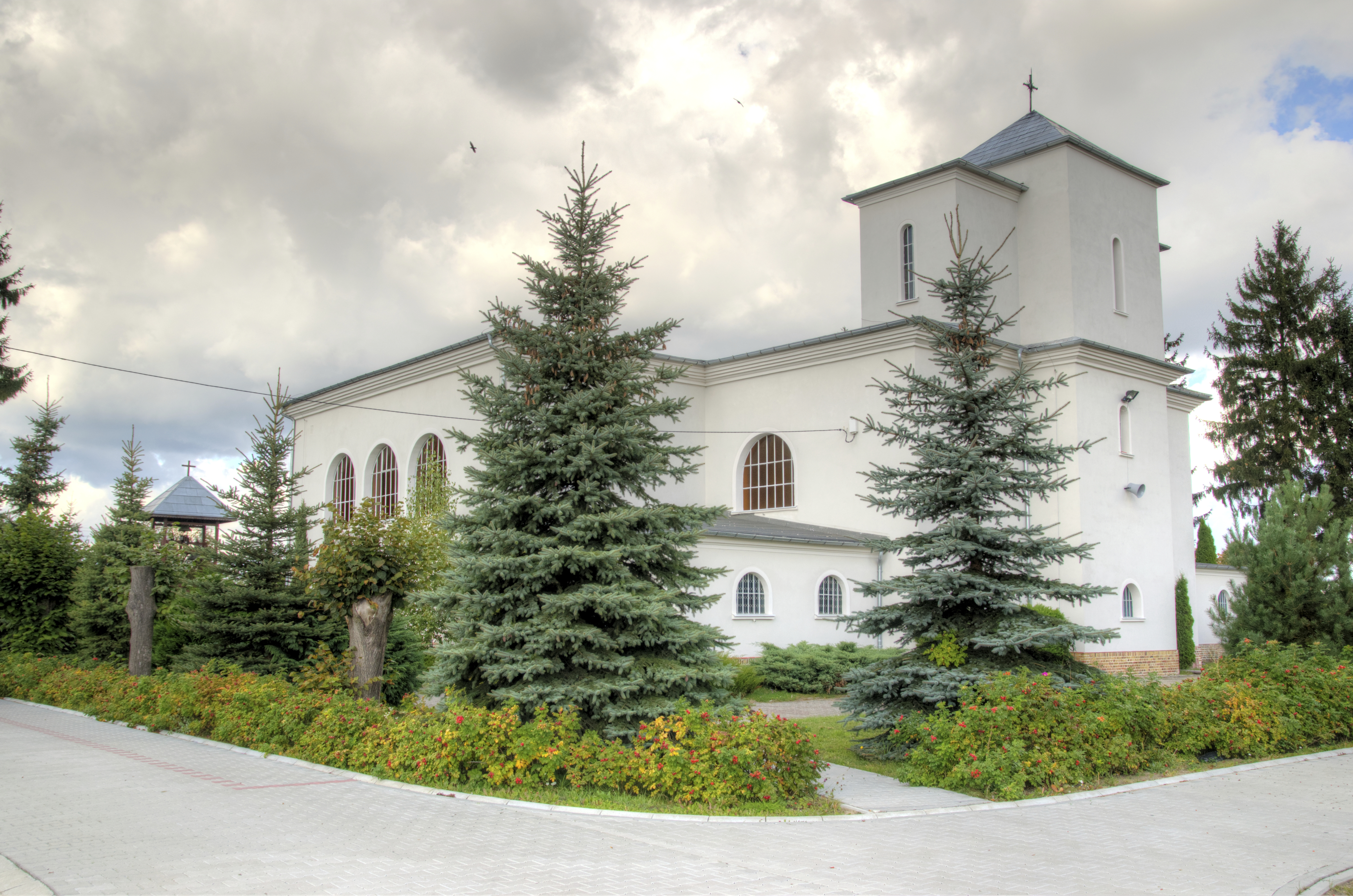 kościół ewangelicki, obecnie rzymsko-katolicki par. pw. Chrystusa Króla z 1936 r. Bolewice, Miedzichowo